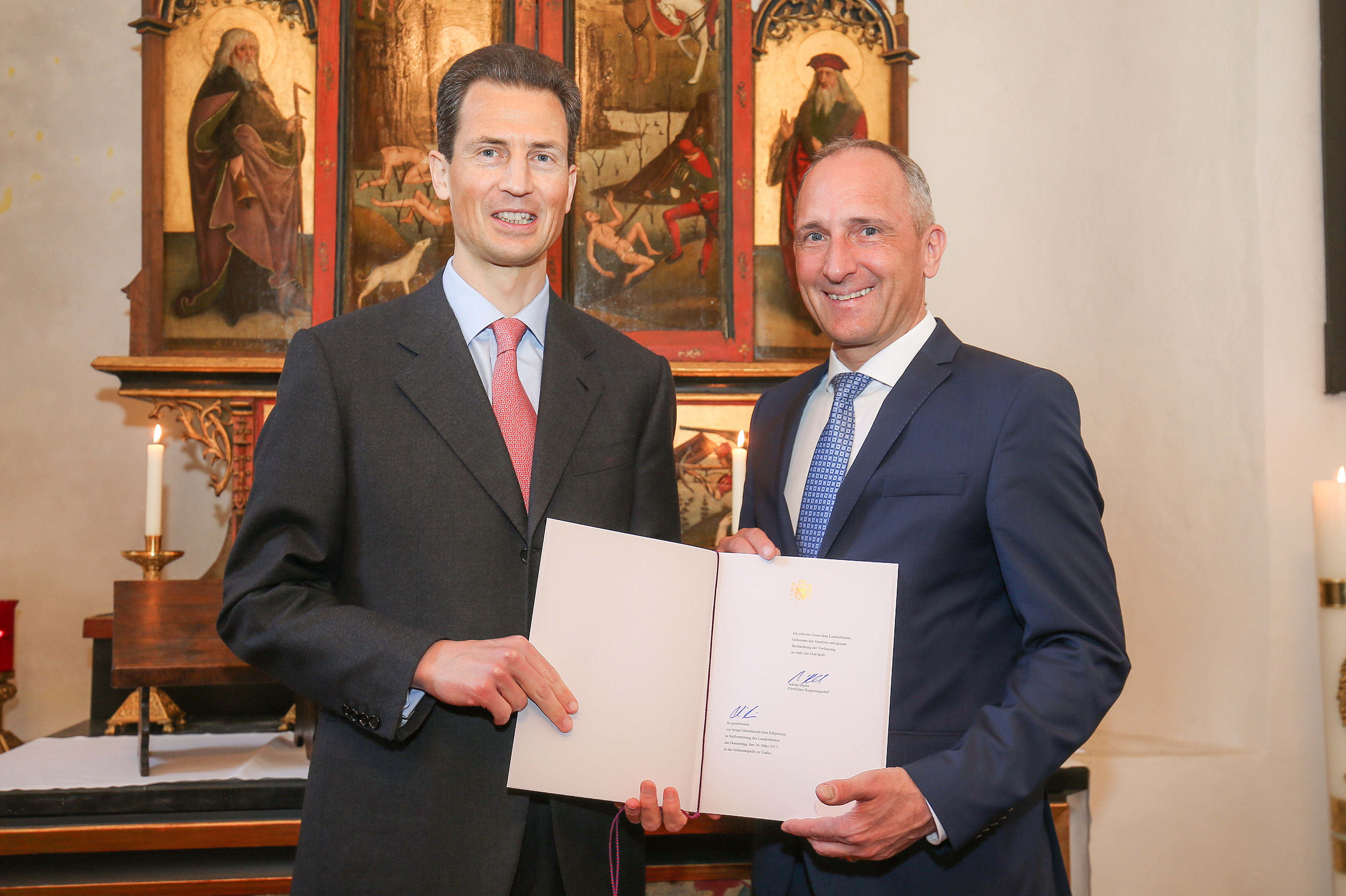 Regierungschef Adrian Hasler, rechts, bei der Vereidigung auf Schloss Vaduz, zusammen mit Erbprinz Alois von Liechtenstein, links, aufgenommen am Donnerstag, 30. März 2017, anlässlich der Vereidigung von Regierungschef Adrian Hasler auf Schloss Vaduz für die Legislaturperiode 2017 - 2021 im Fürstentum Liechtenstein.